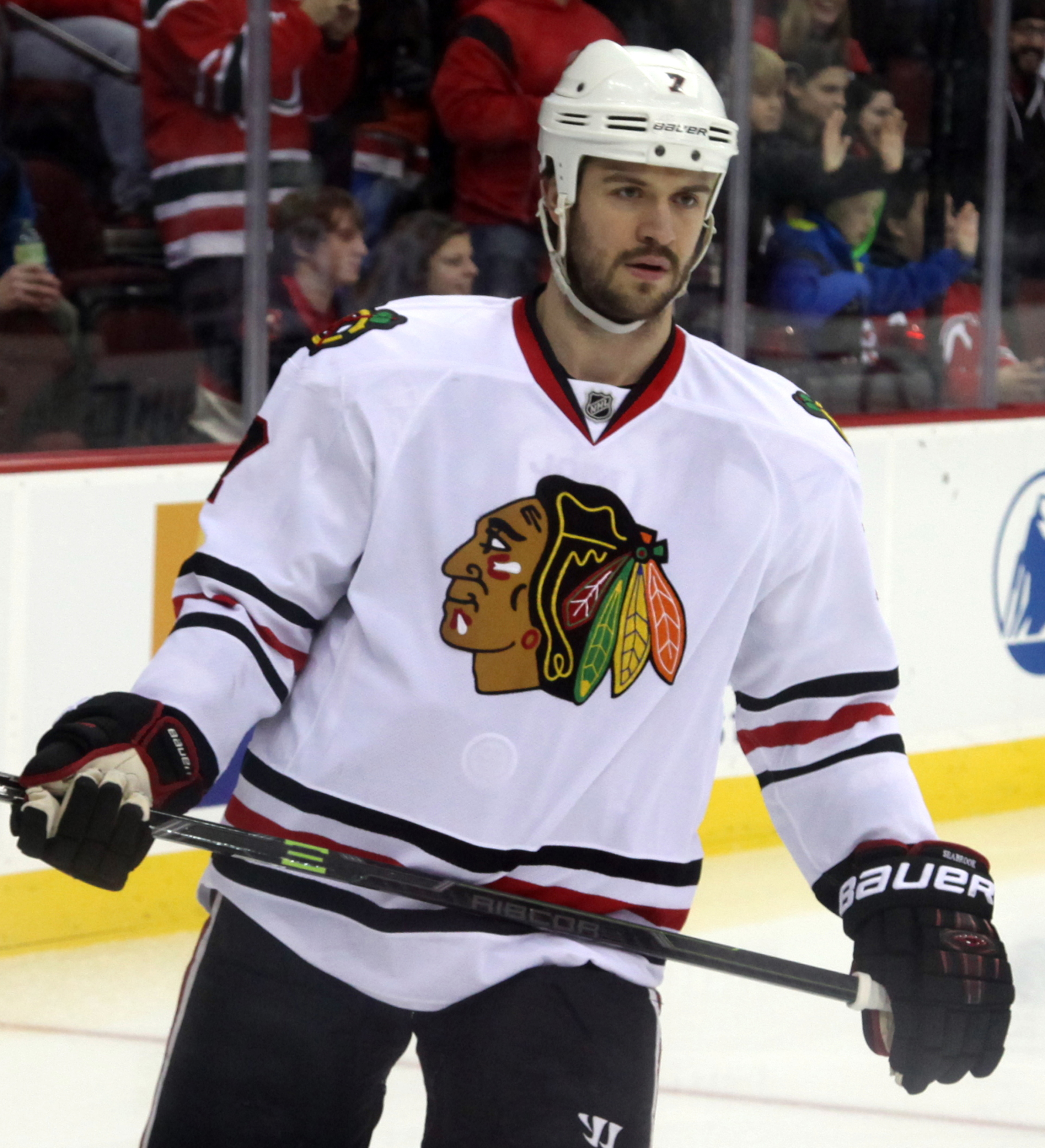 Brent Seabrook in December 2014.